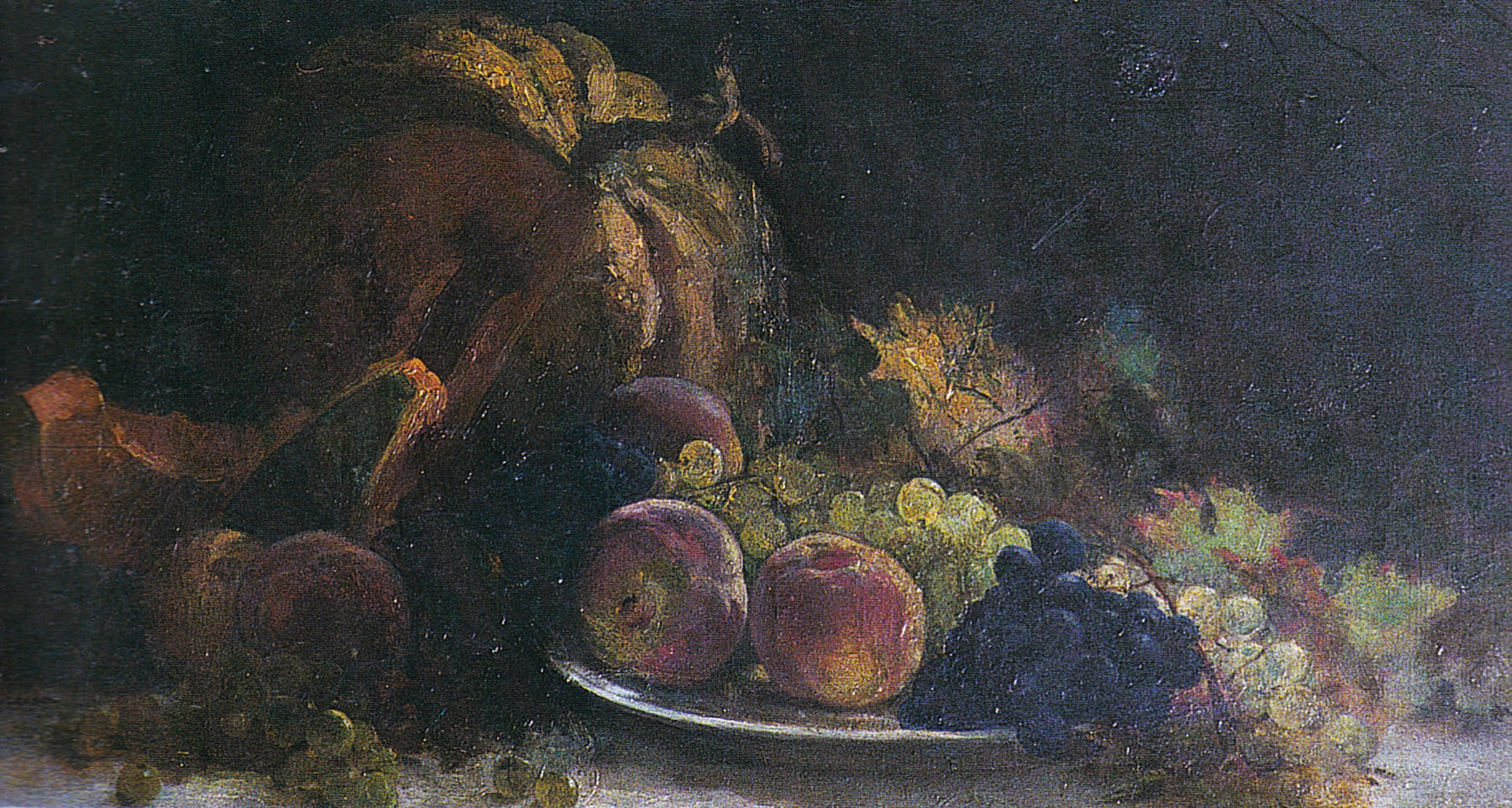 Natura moarta cu fructe (1864)